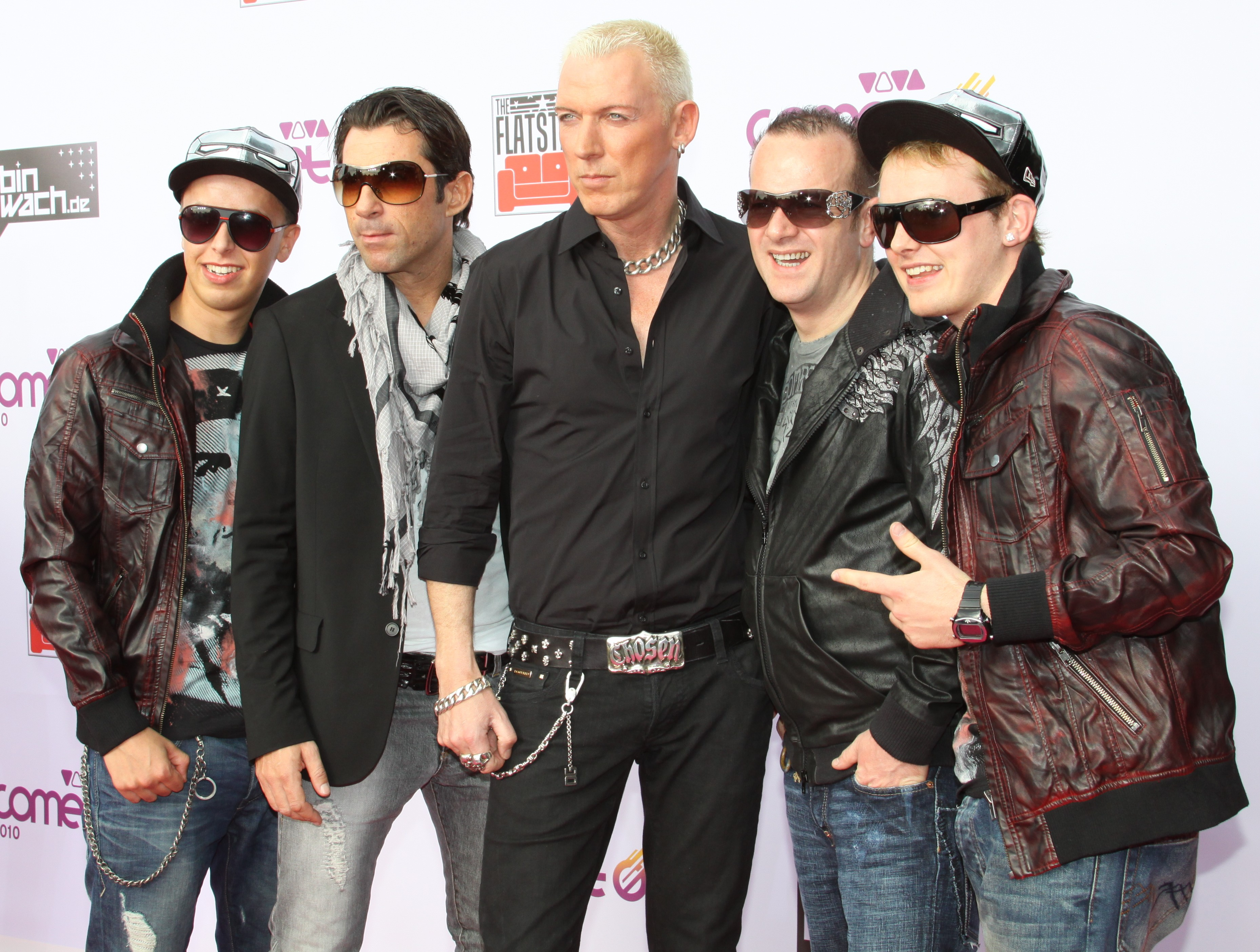 Die Band Scooter mit Tänzern auf dem Viva Comet 2010 in Berlin